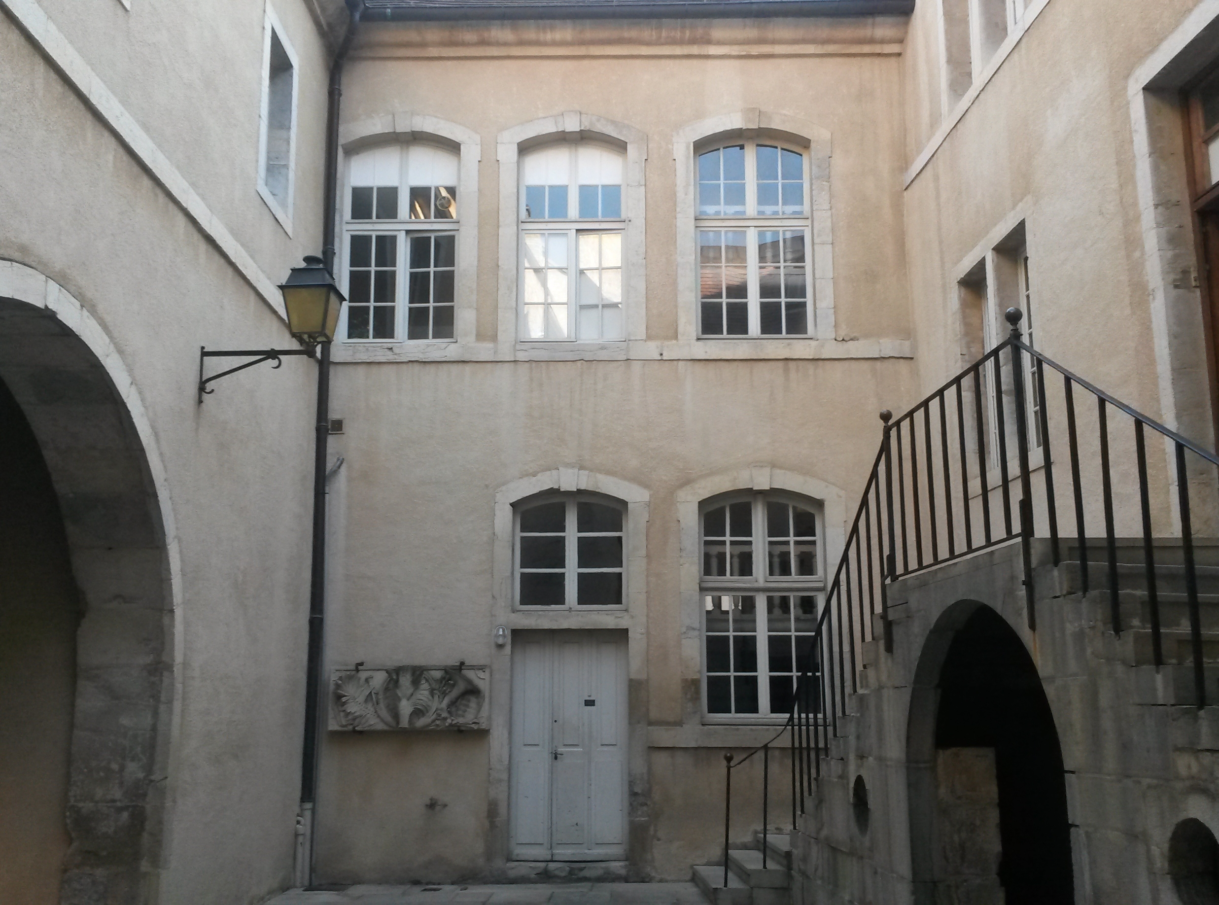 Vesoul - Siège Salsa